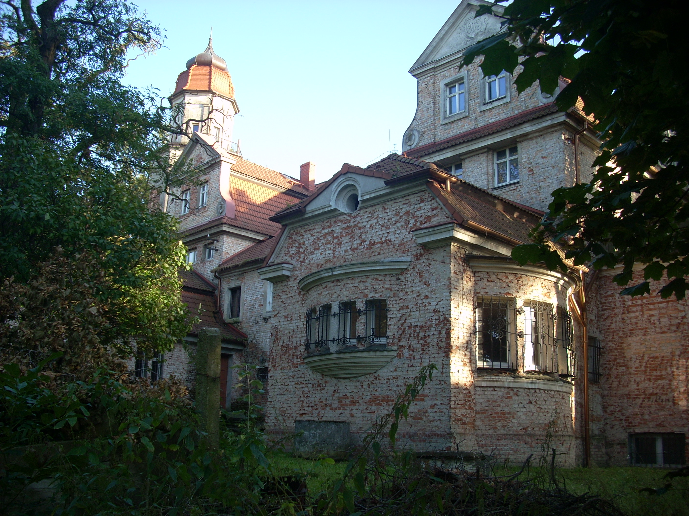 Pałac w Janowie